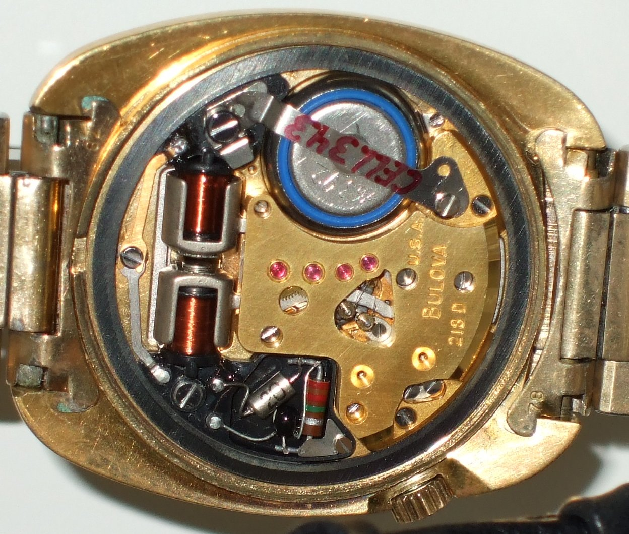 Stimmgabeluhr Accutron. (Ausstellungsstück der Uhrensammlung Karl Gebhardt in Nürnberg )